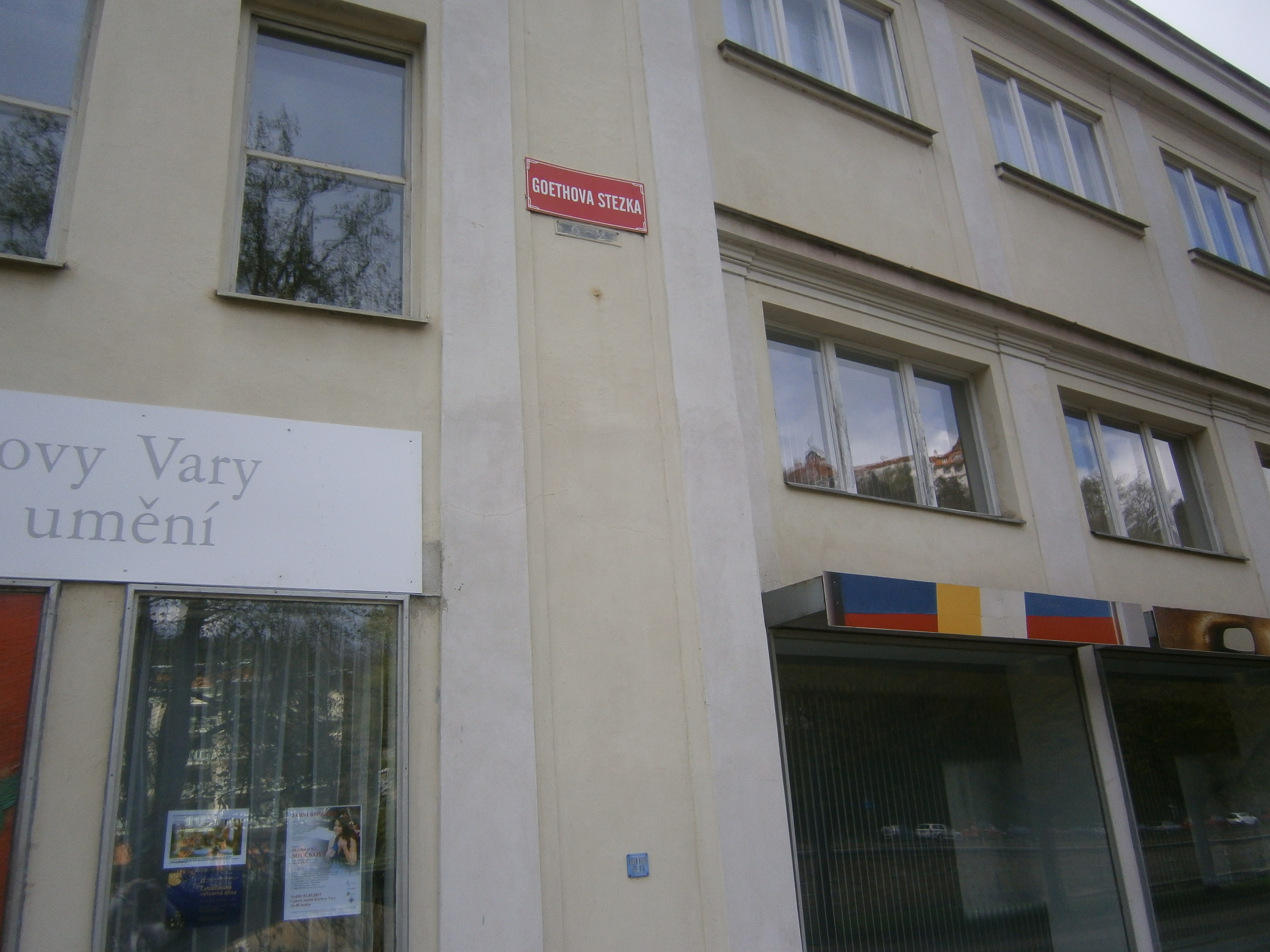 Tschechisches Straßenschild: Goethesteig (Goethova Stezka) in Karloy Vary.